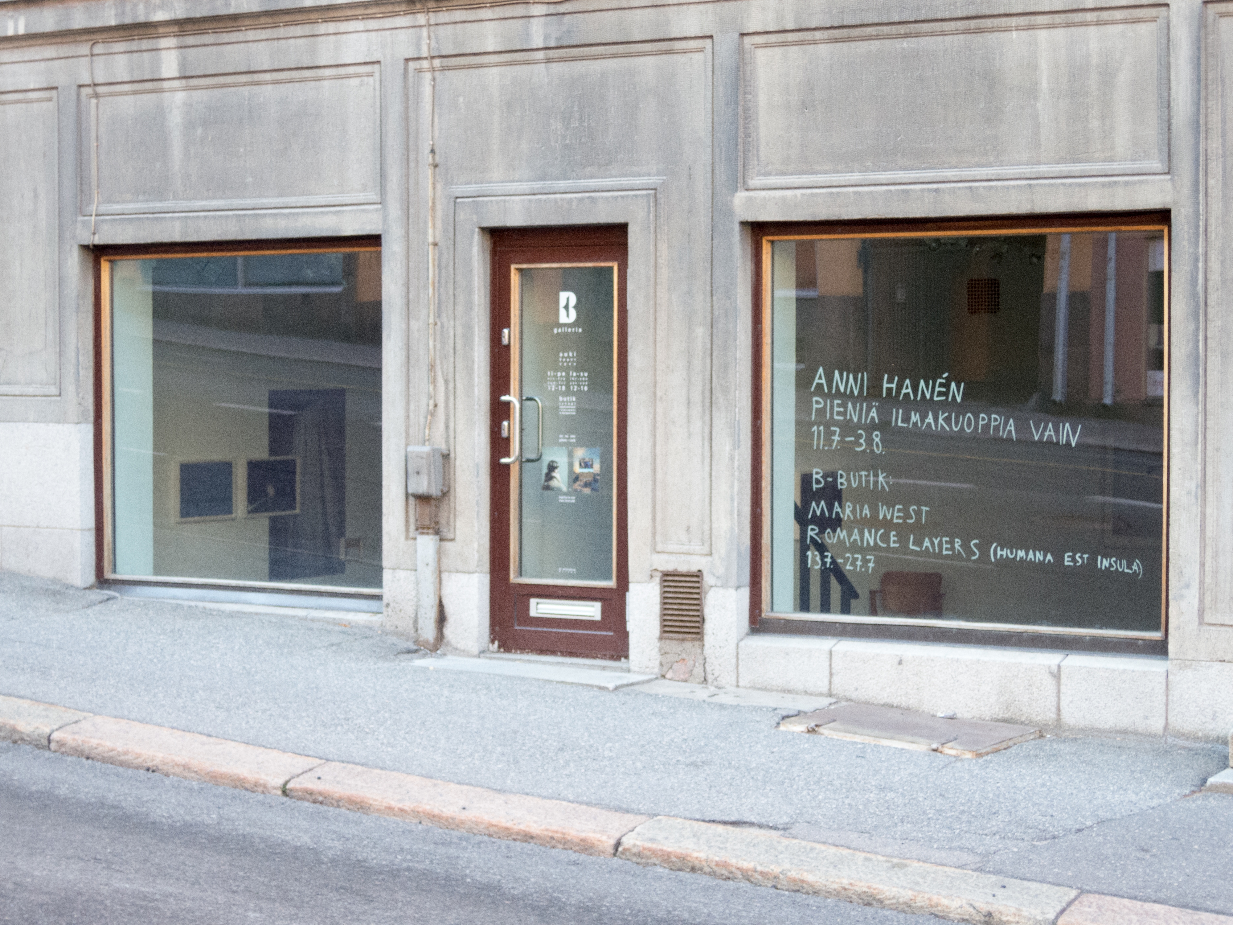 B-galleria turussa